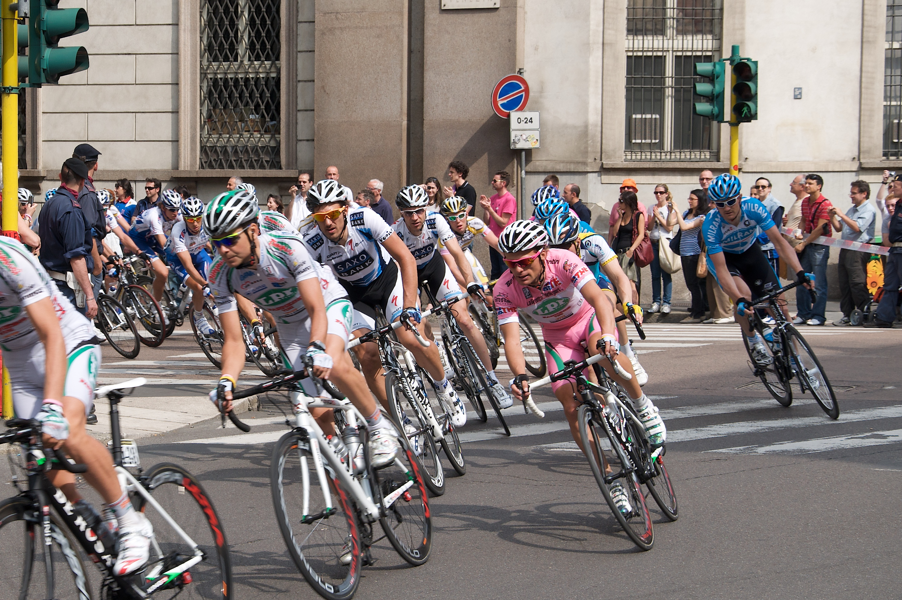 Maglia Rosa Danilo di Luca during Milano show stage of Giro d'Italia 2009 in Corso Venezia